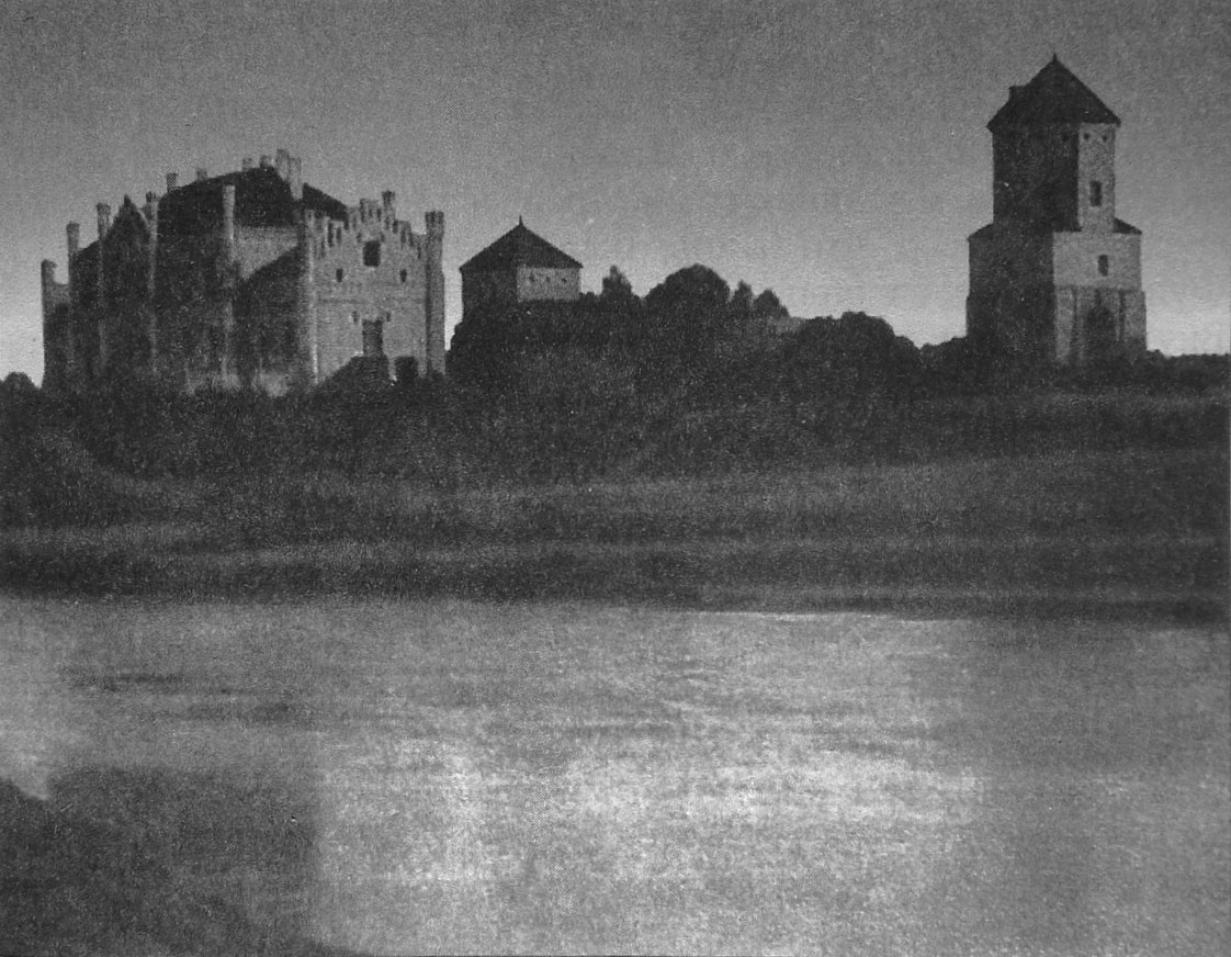 Беларуская (тарашкевіца): Любча (Lubča). Замак з боку Нёмана (Nioman)